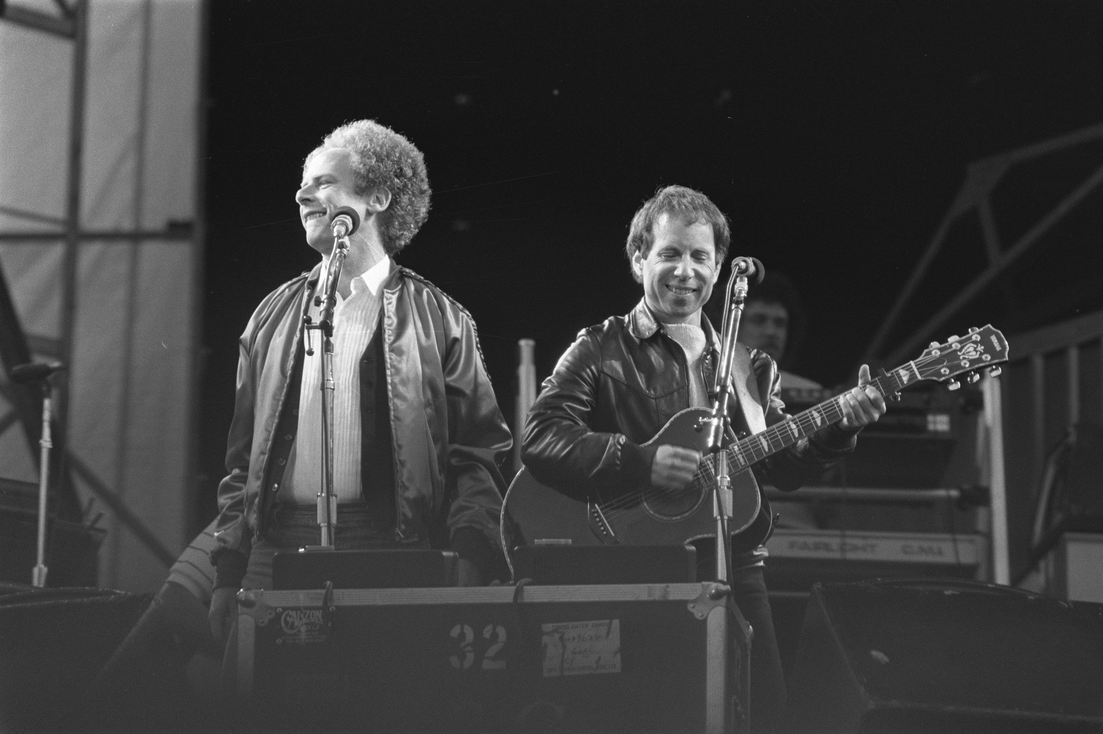 Collectie / Archief : Fotocollectie Anefo Reportage / Serie : [ onbekend ] Beschrijving : Optreden Simon and Garfunkel (links) in Feijenoordstadion, Rotterdam Datum : 12 juni 1982 Locatie : Rotterdam, Zuid-Holland Trefwoorden : musici, muziek, popgroepen, zangers Persoonsnaam : Garfunkel, Art, Simon, Paul Instellingsnaam : Simon & Garfunkel Fotograaf : Bogaerts, Rob / Anefo Auteursrechthebbende : Nationaal Archief Materiaalsoort : Negatief (zwart/wit) Nummer archiefinventaris : bekijk toegang 2.24.01.05 Bestanddeelnummer : 932-2091